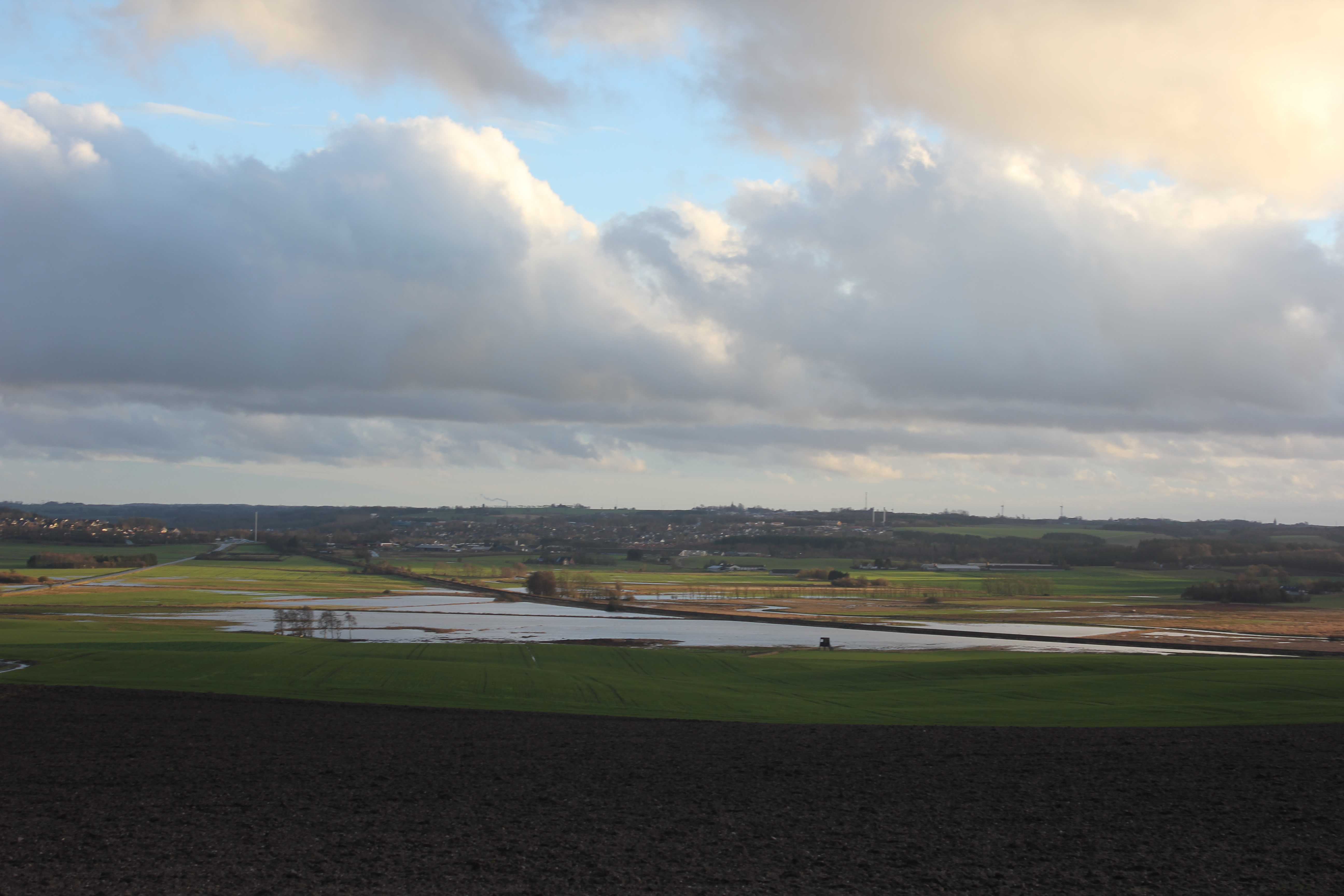 Vådområdet 'Vissing Enge' 2 km vest for Hadsten.